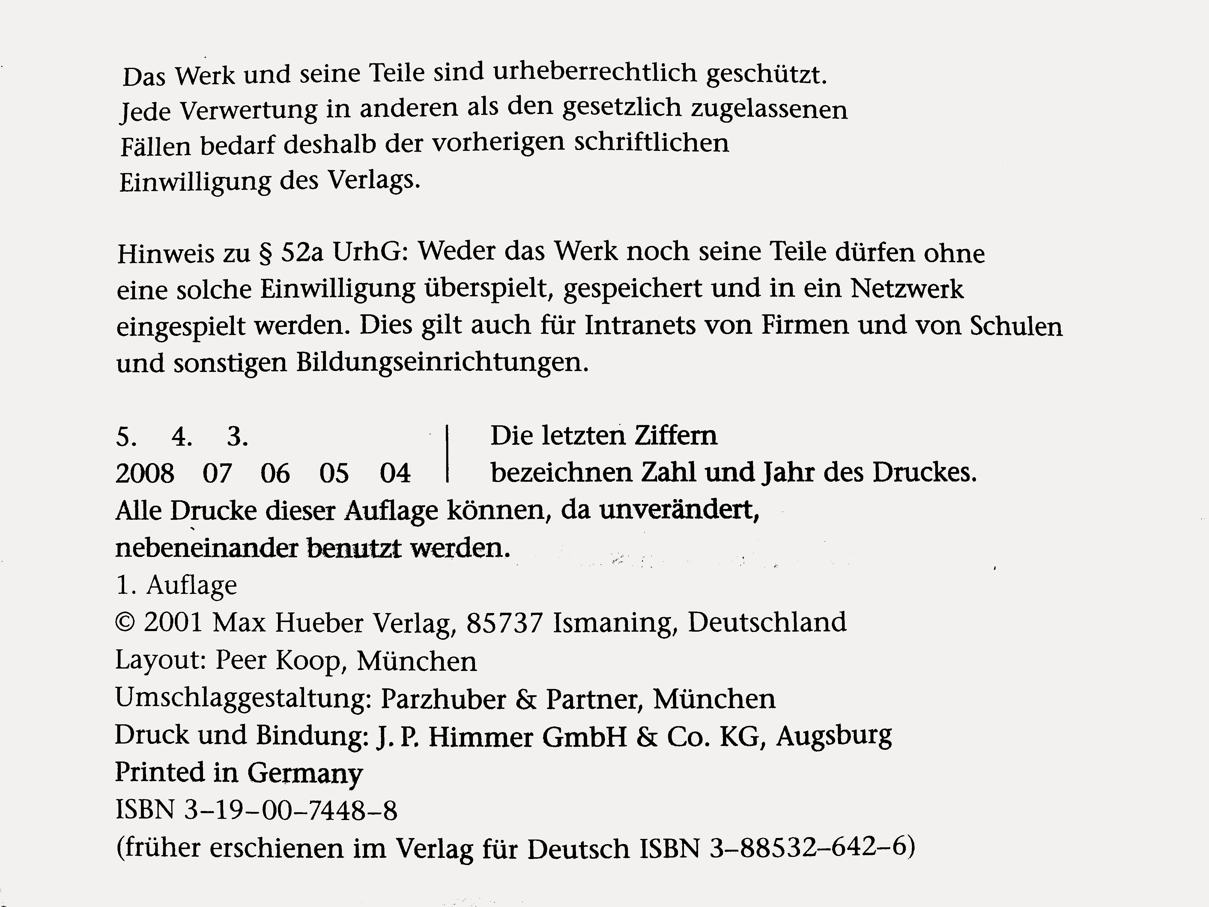 Strona redakcyjna książki wydanej w Niemczech z komentarzem dotyczącym printer's key